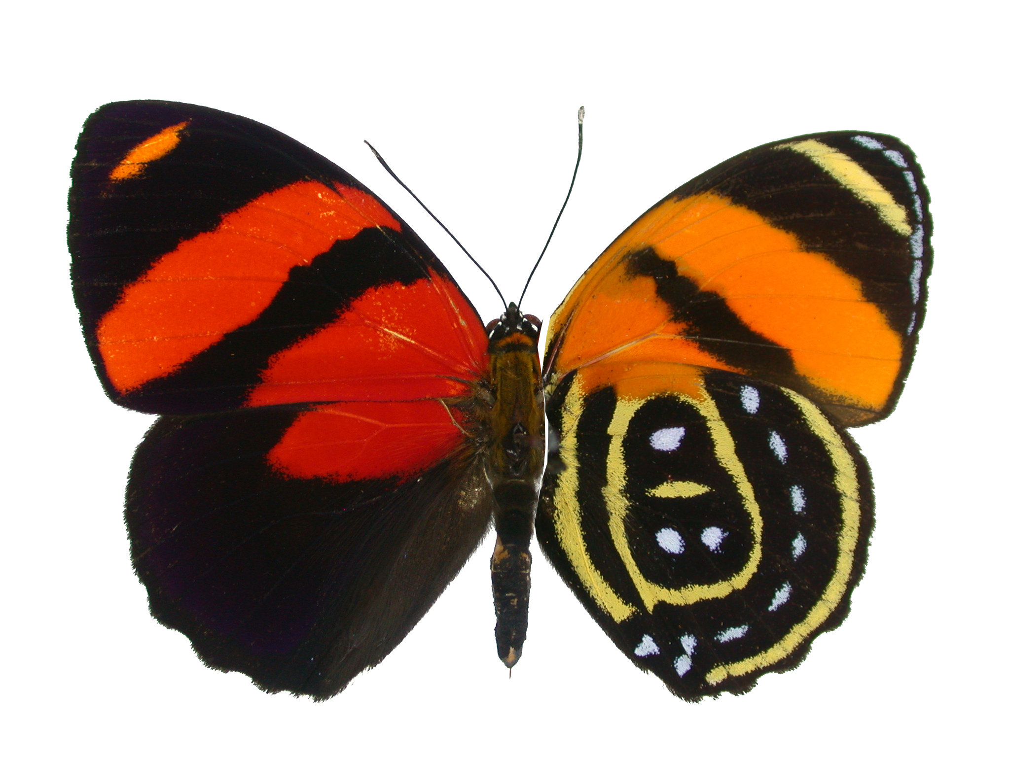 Callicore cynosura form Ecuadorean Amazonia